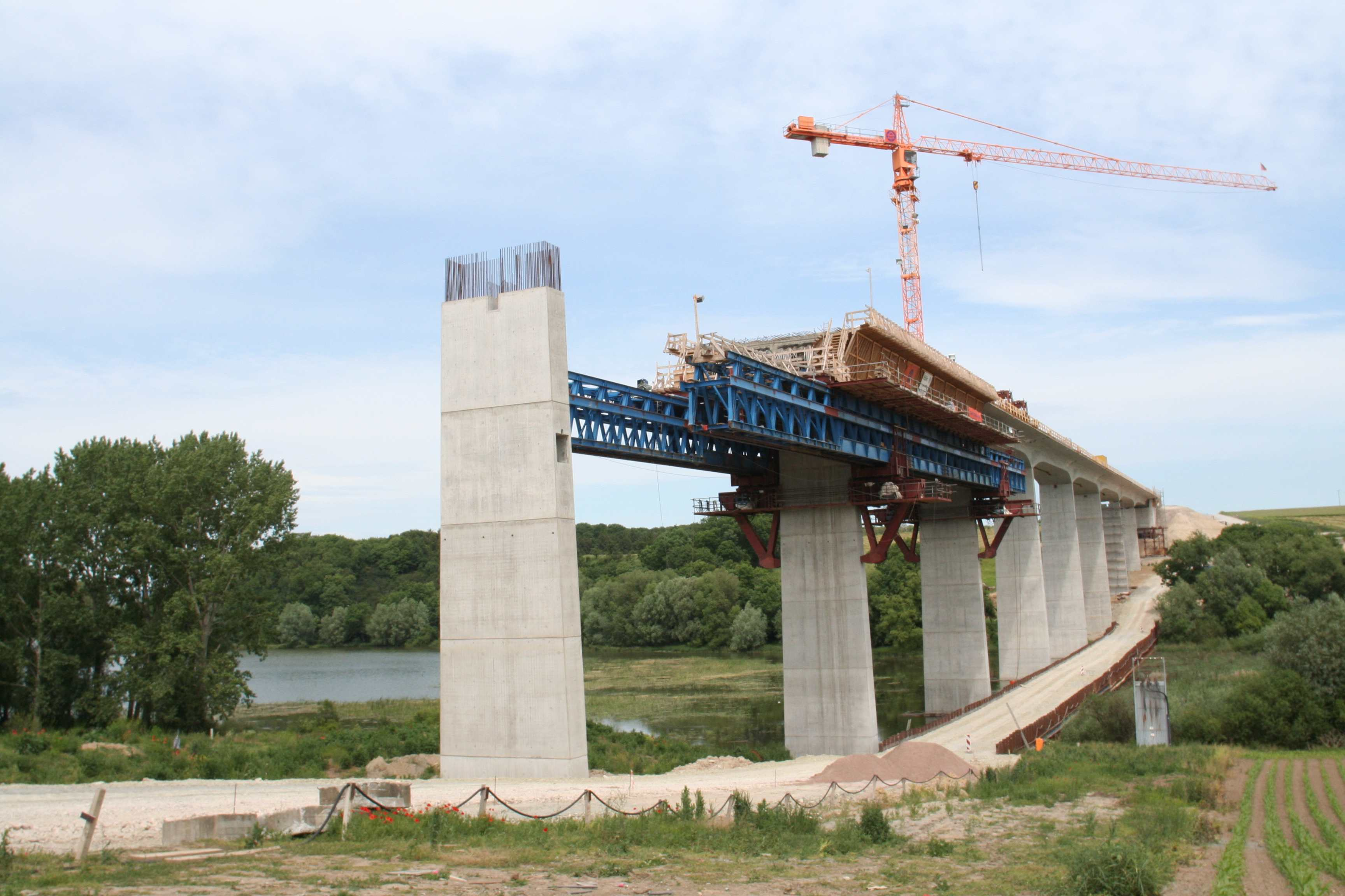 Scherkondetalbrücke bei Krautheim in Thüringen